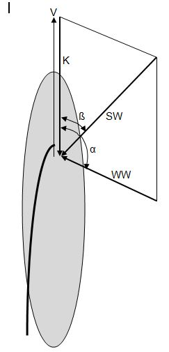 V = snelheid boot, H = kopwind, WW = ware wind, SW = schijnbare wind, a = invalshoek WW, b = hoek SW met scheepskoers